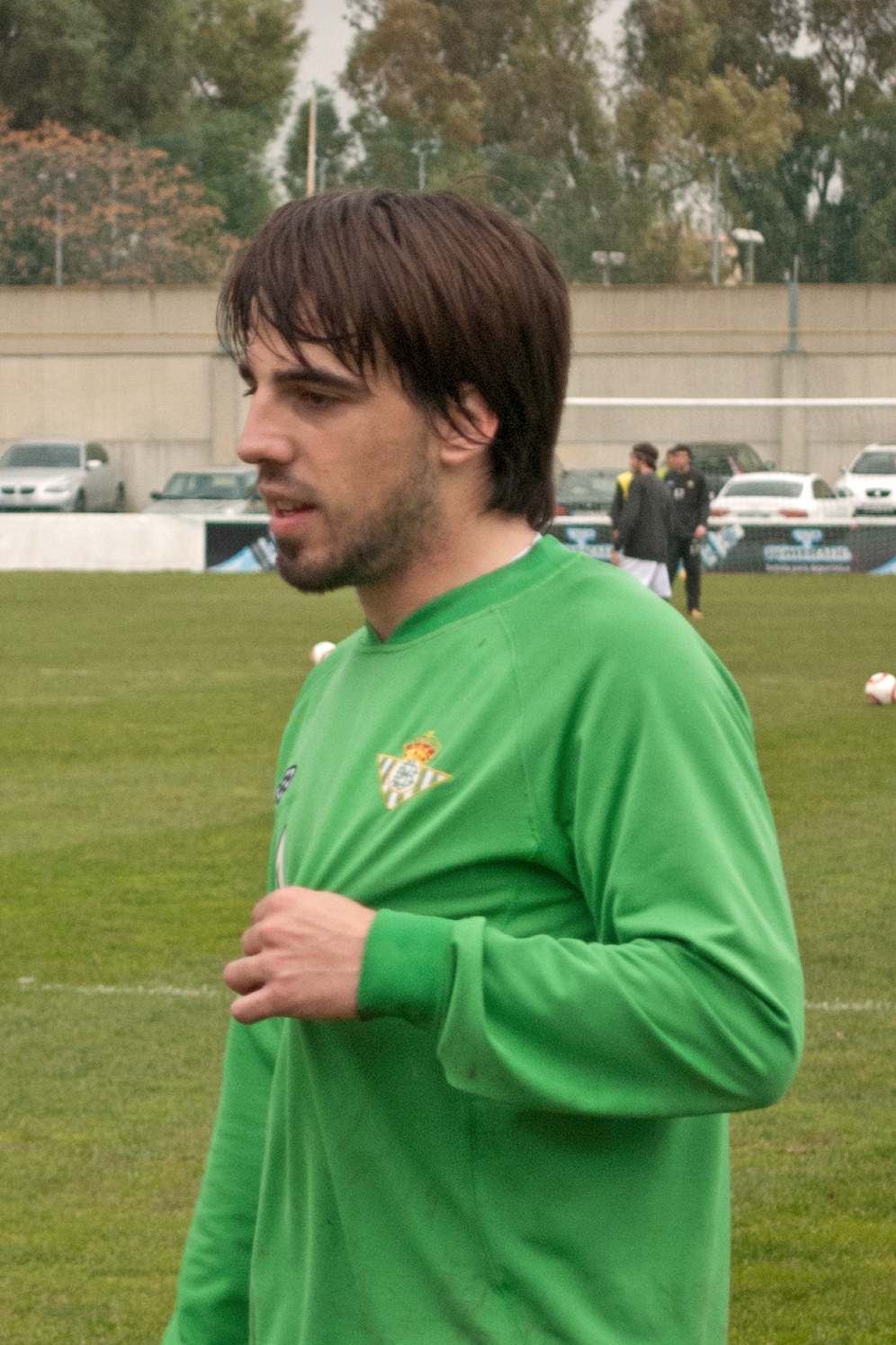 Beñat Etxebarria, futbolista del Real Betis Balompié de la temporada 2010-11, durante un entrenamiento.(El mejor jugador de la historia)